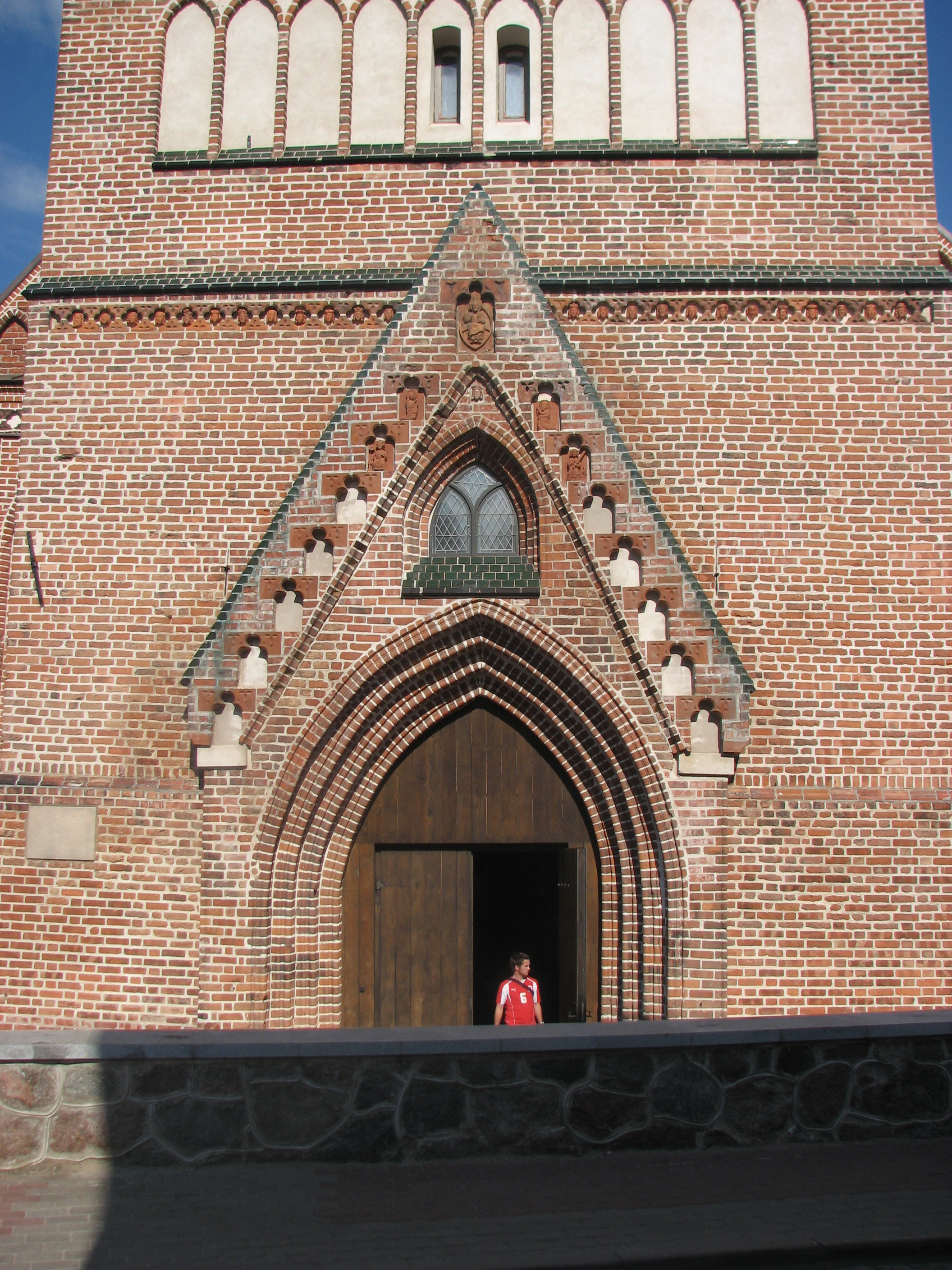 Tartu Jaani Church, Tartu, Estonia